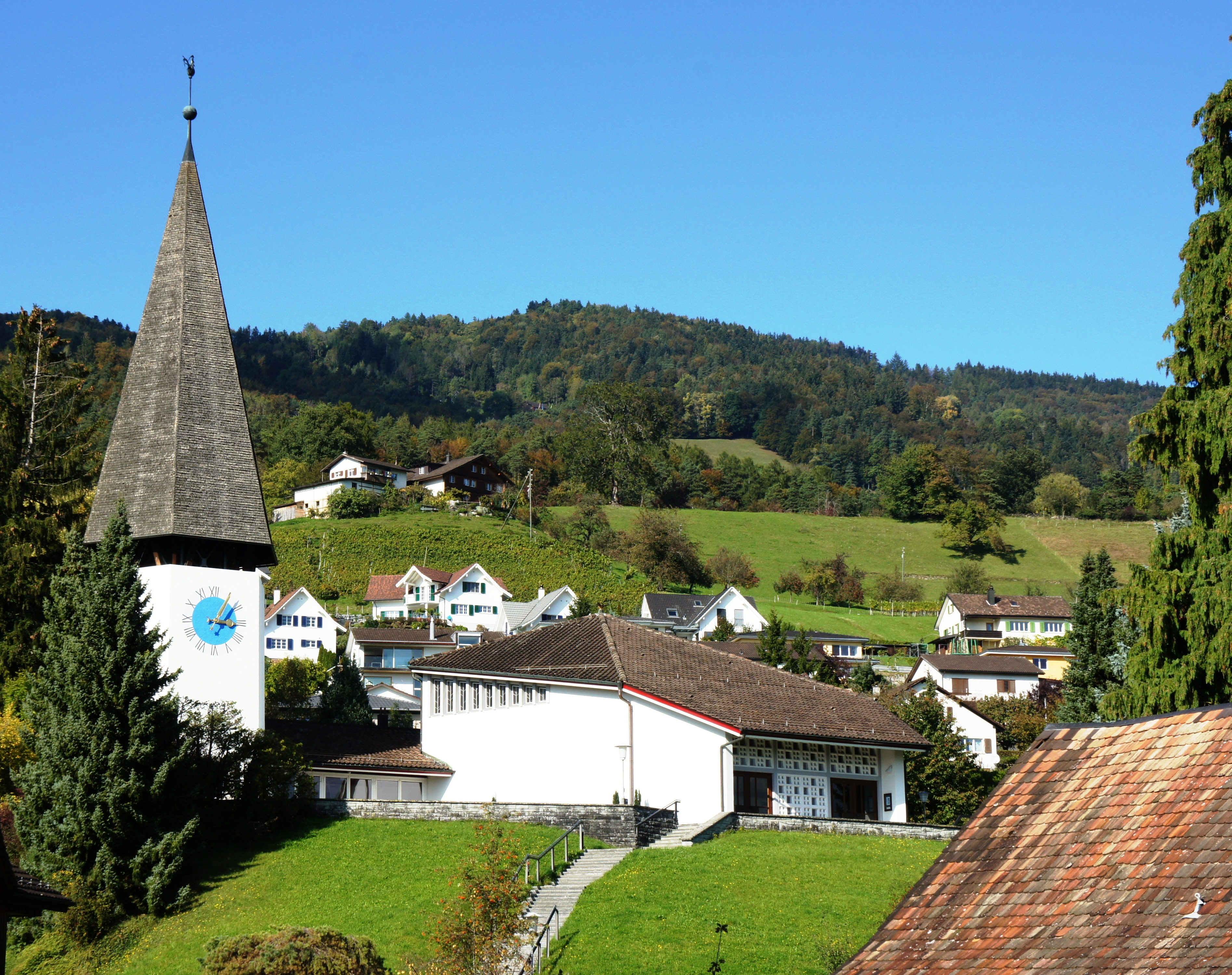 Die ref. Kirche in Marbach SG aus Richtung Süden. Links neben der Kirche steht, mit einem eistöckigen Anbau verbunden, der Kirchturm mit Zifferblatt auf hellblauem Grund. Der Dachstuhl des Glockenturmes ist mit Schindeln verkleidet. Zuoberst dreht als Windfahne ein metallener Hahn. Im Vordergrund eine Treppe, die von der Bergstrasse zum Eingang der Kirche hinauf führt. Im Hintergrund Einfamilienhäuser, Rebberge, Wiesen und Wälder oberhalb des Dorfes.